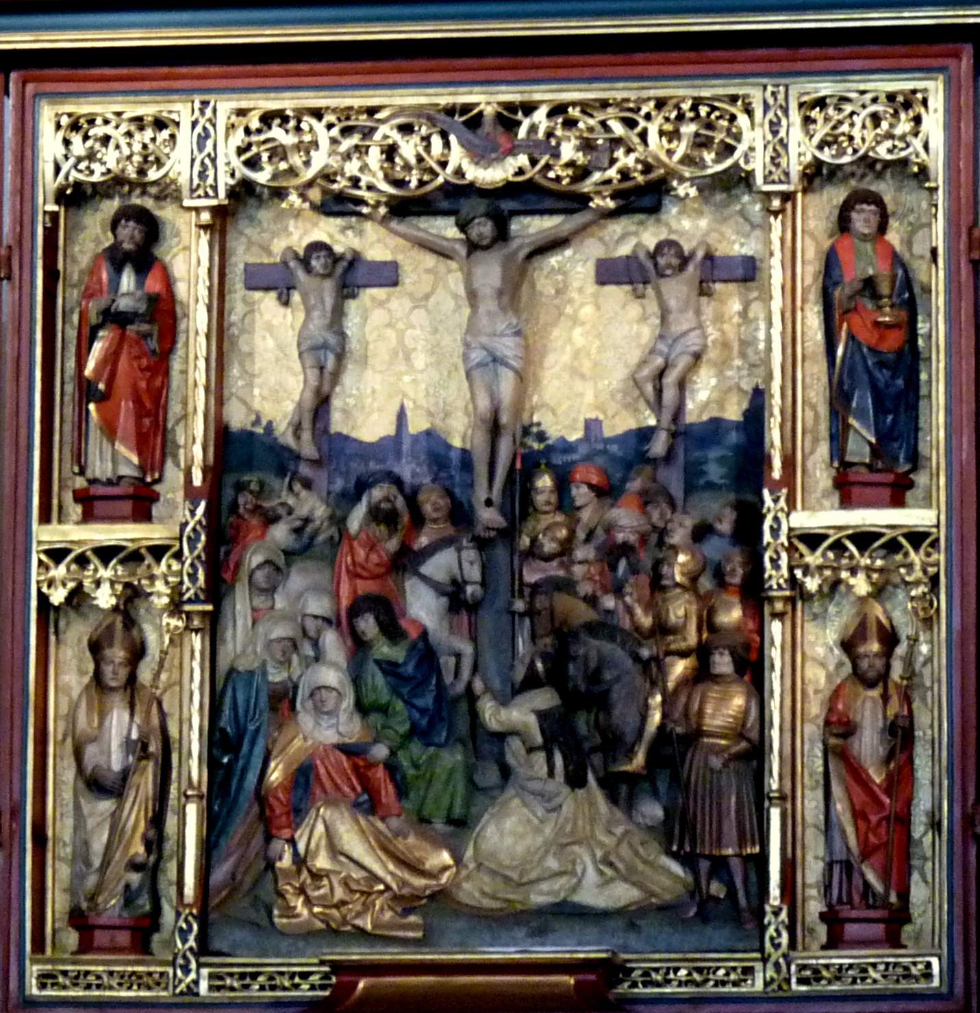 Spätgotischer Flügelaltar in der Pfarrkirche Tirschenreuth. MittelschreinThis is a photograph of an architectural monument.